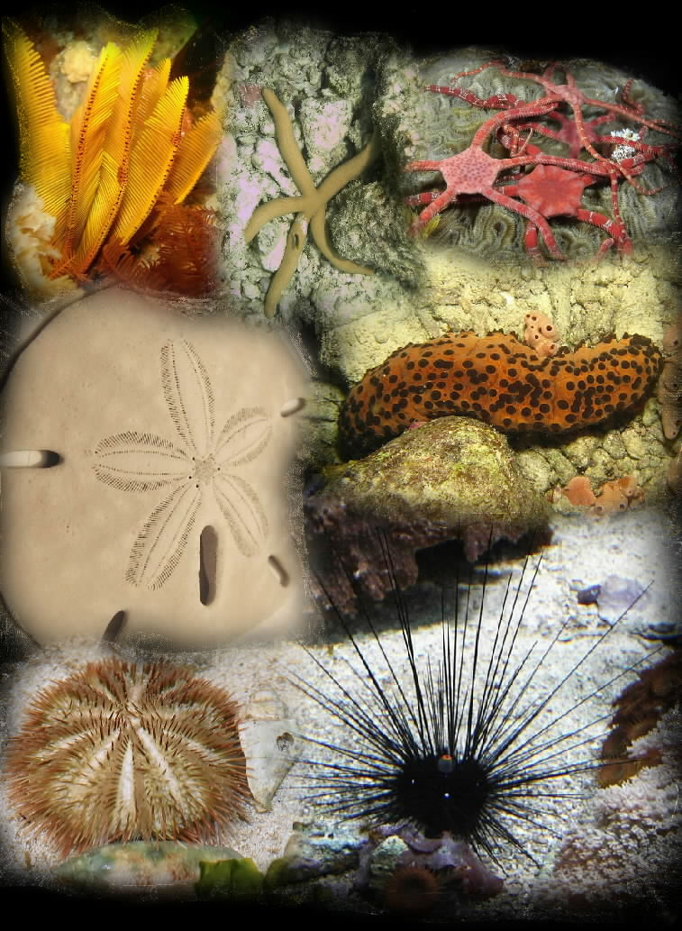 Equinodermos de Venezuela: Parte superior Tropiometra carinata (Lamarck, 1816) Linckia guildingi Gray, 1840 Ophioderma rubicunda Lütken, 1856 Parte Media Mellita quinquiesperforata latiambulacra H. L. Clark, 1940 Holothuria mexicana Ludwig, 1875 Parte Inferior Lytechinus variegatus (Lamarck, 1816) Diadema antillarum (Philippi & Agassiz, 1863)